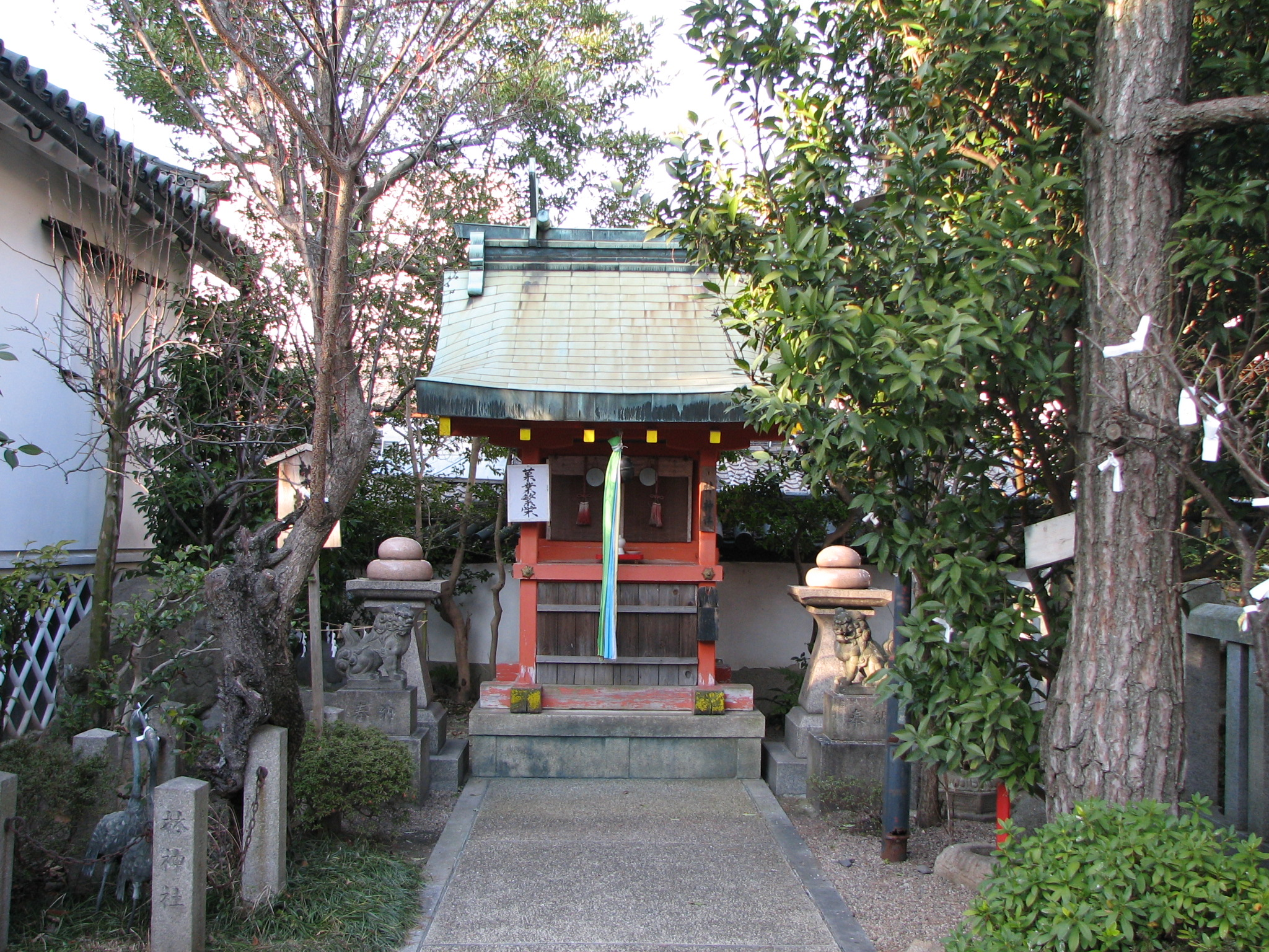 Rin Shrine in Kangō Shrine, Nara, Nara, Japan 漢國神社内 林神社（奈良県奈良市）